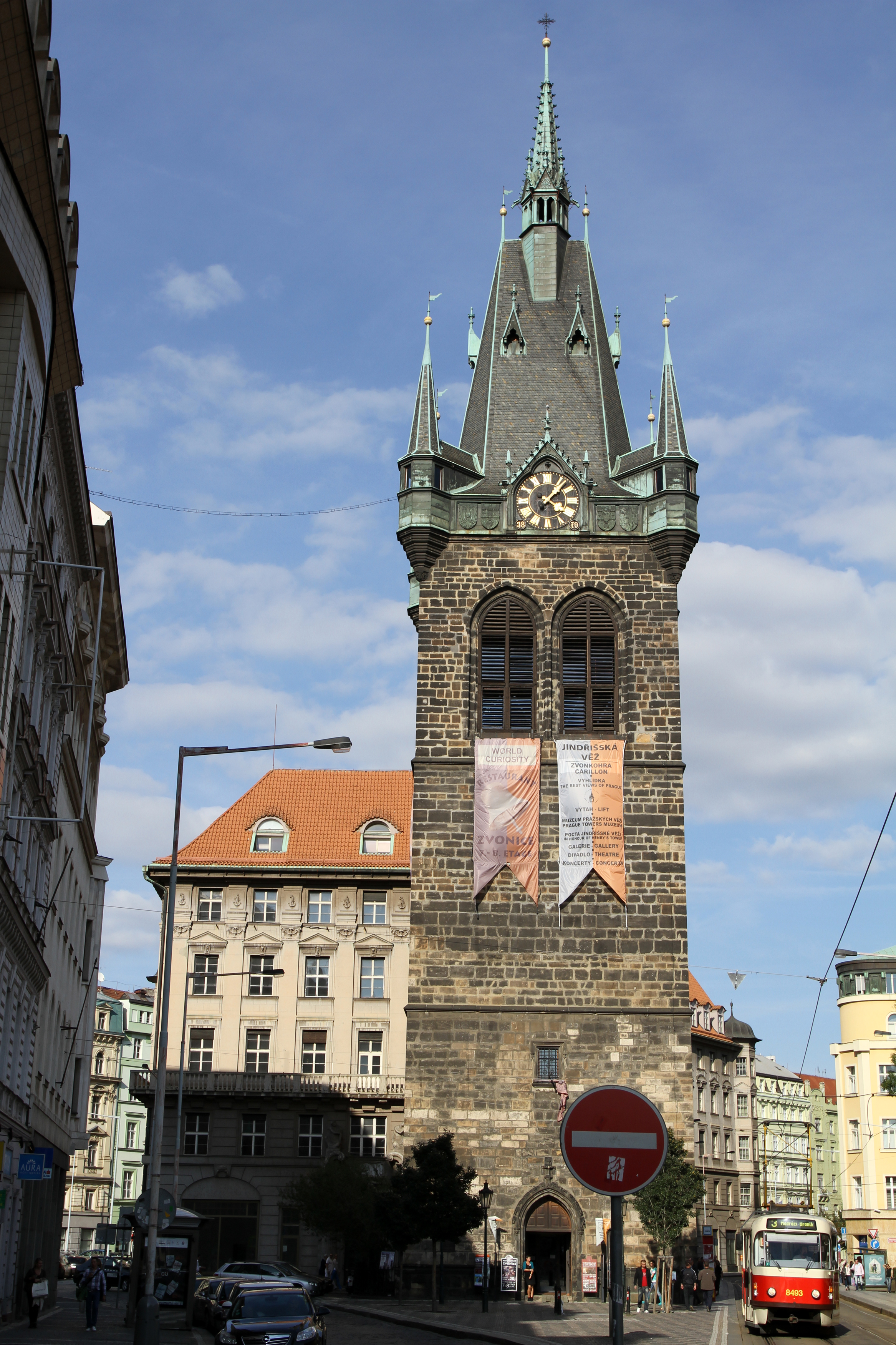 Kostel sv. Jindřicha a sv. Kunhuty se Svatojindřišskou zvonicí (Nové Město), Praha 1, Jindřišská, Nové Město